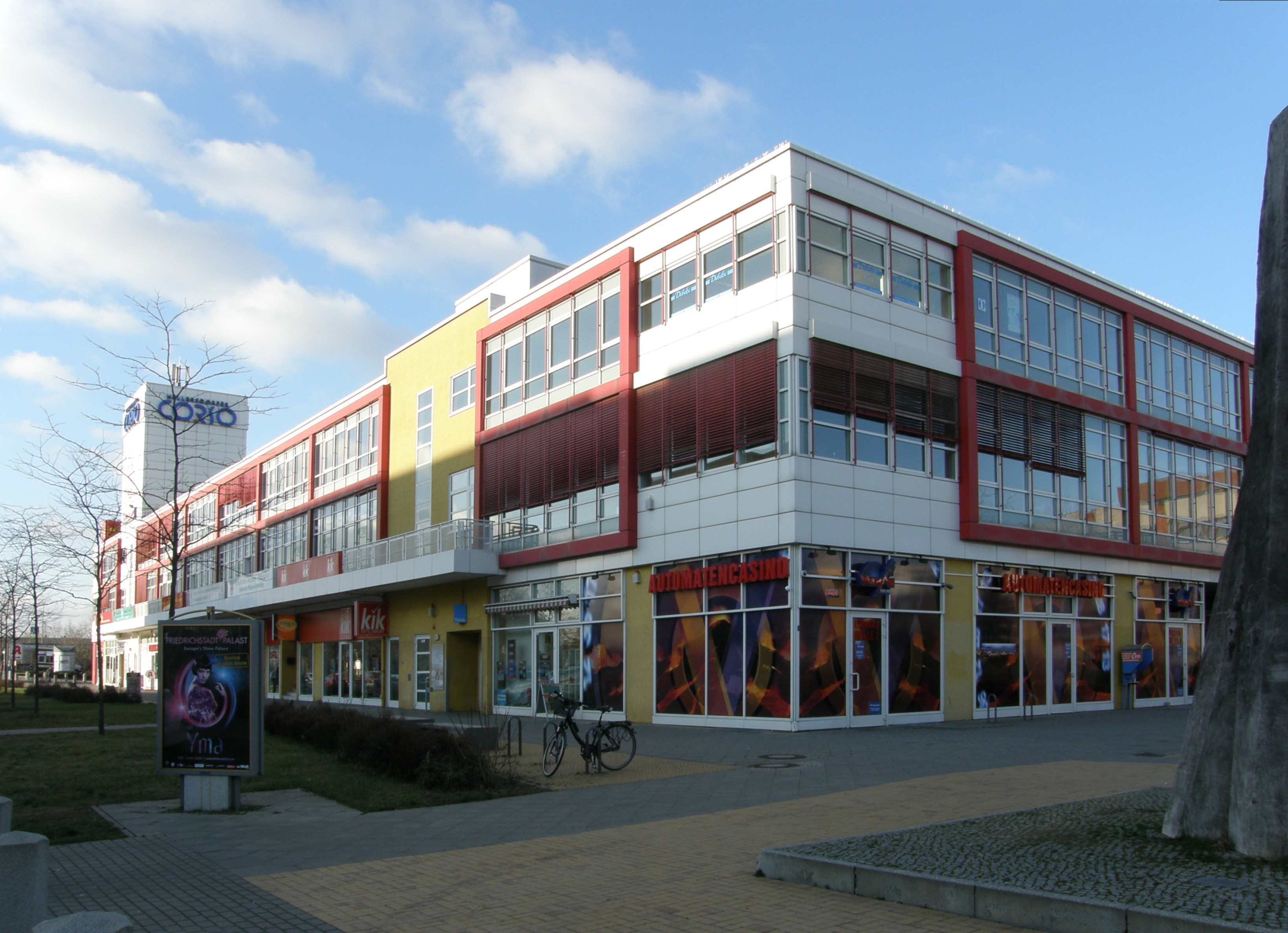 Berlin-Hellersdorf, Neue Grottkauer Straße: Kunst